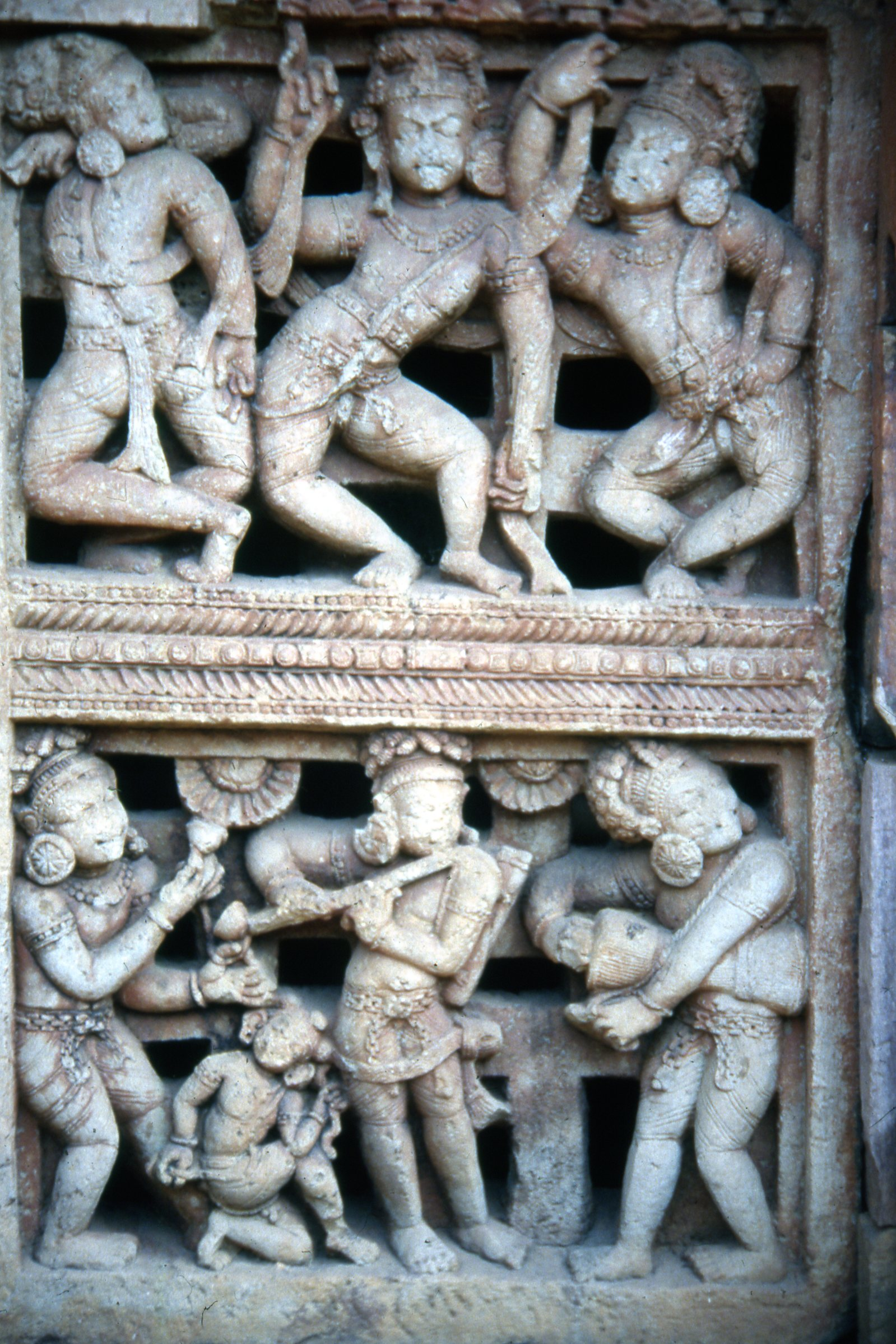 Siglo VII, Templo Parashurameshvara, Tragaluz con representaciones de danzantes en la parte superior y de músicos en la parte inferior. Bhuvanesvar,Orissa, India.